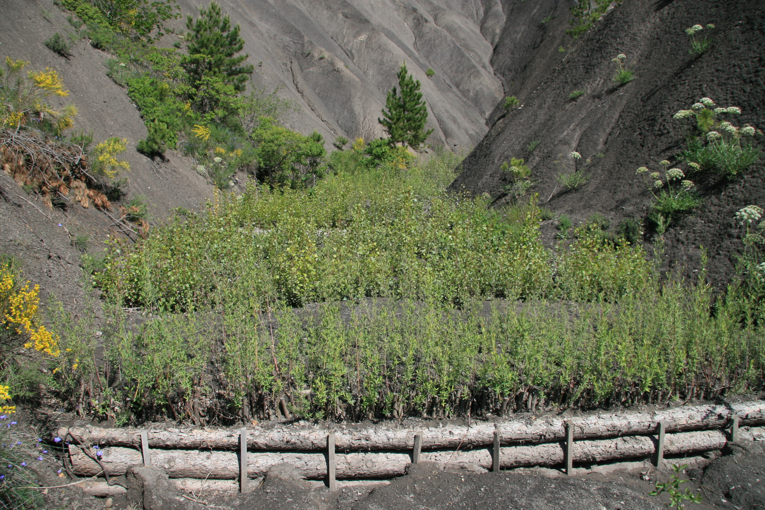 Ouvrage de génie végétal du bassin de la Durance